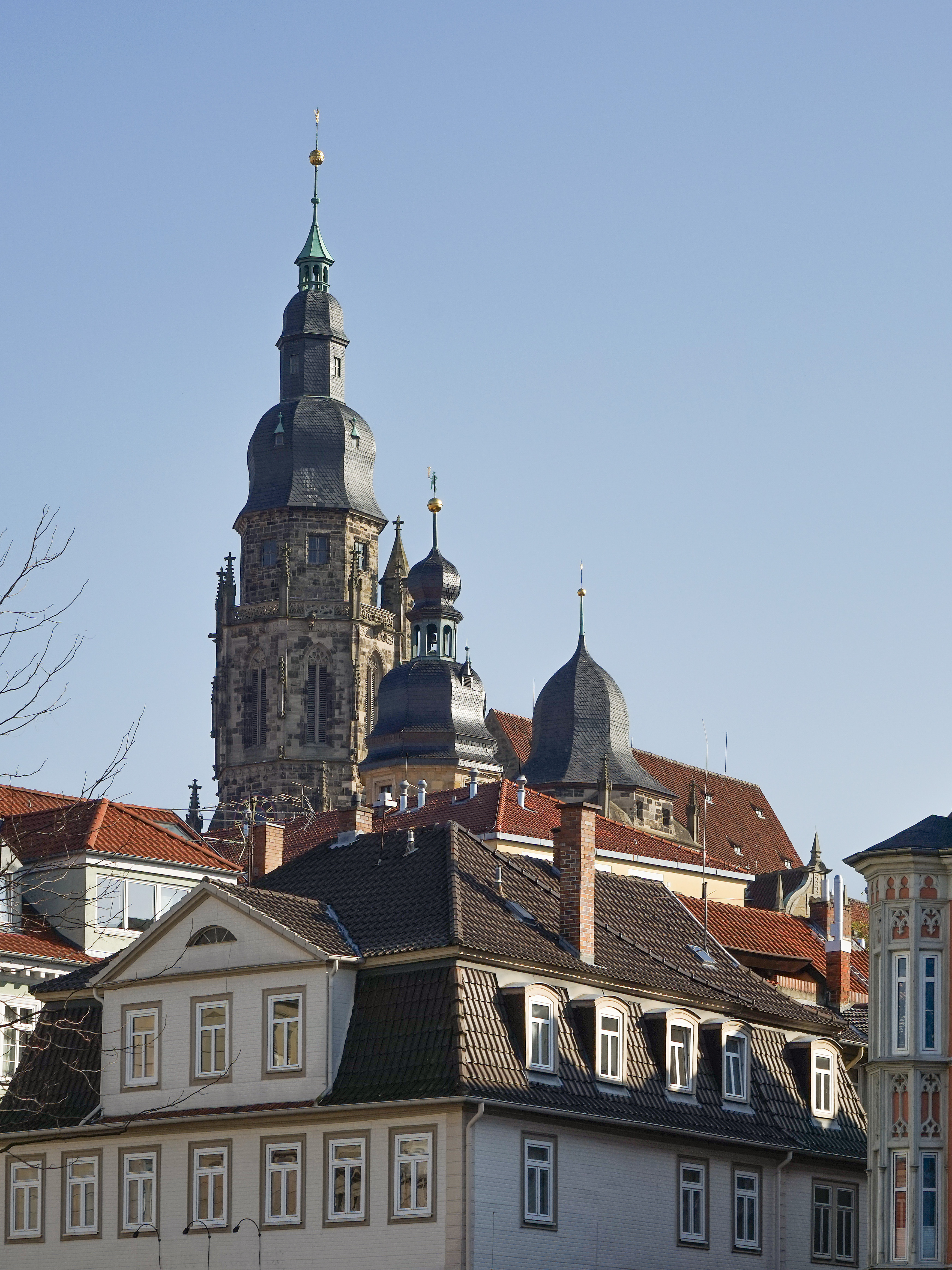 Der Drei-Türme-Blick vom Albertsplatz